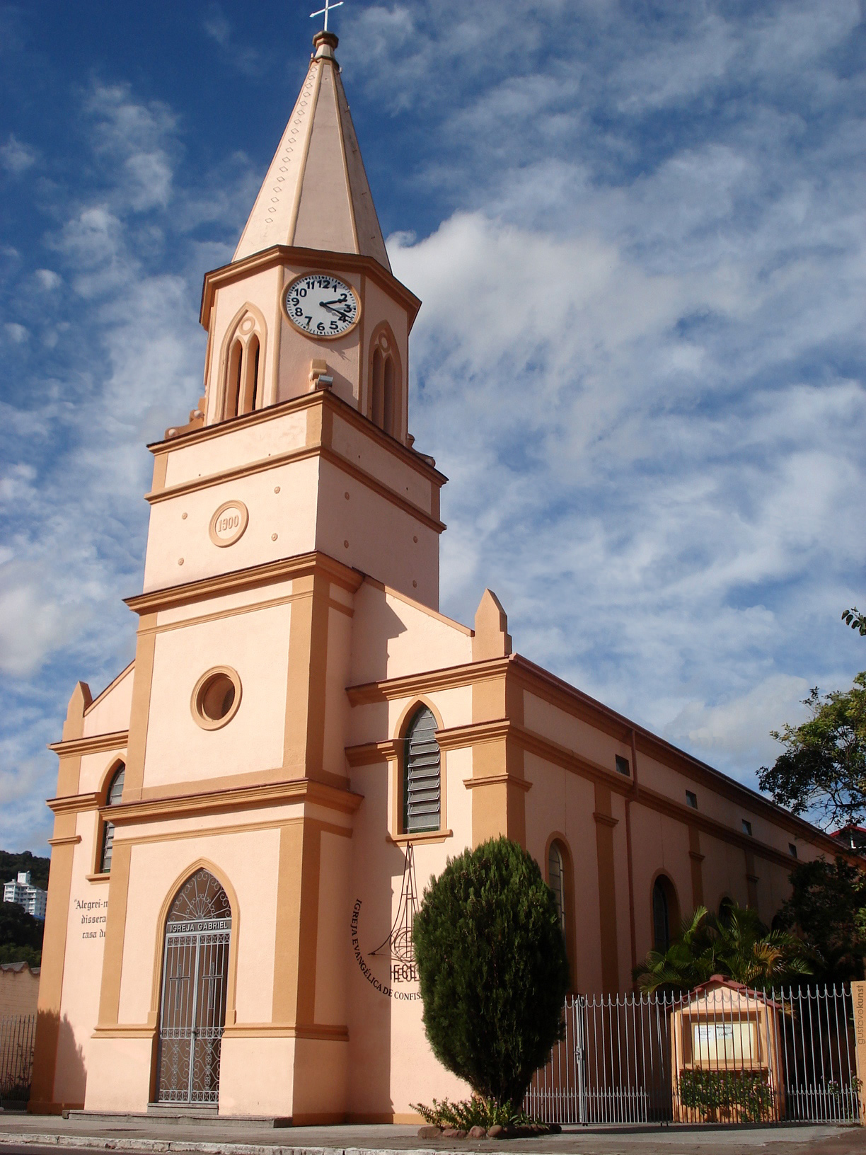 Igreja Gabriel em Igrejinha, Rio Grande do Sul, Brasil.